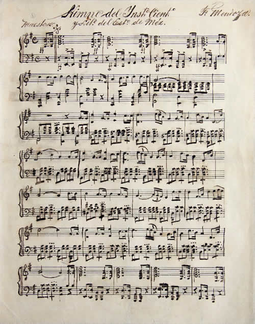 Himno de la Universidad Autónoma del Estado de México